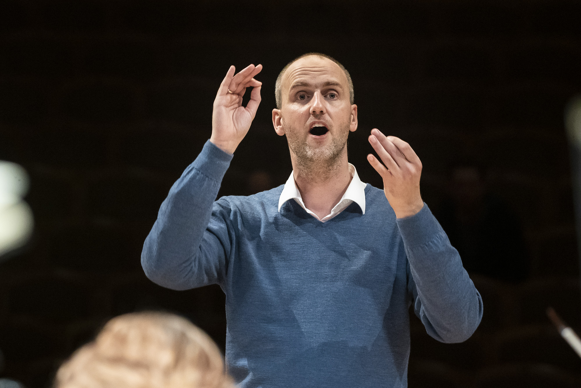 Peter Dijkstra J.S. Bach Weihnachts-Oratorium BWV 248, Praha, Rudolfinum, Collegium 1704, Peter Dijkstra dirigent, sólisté Hannah Morrison soprán, Maarten Engeltjes kontratenor, Benedikt Kristjansson tenor, Tobias Berndt bas